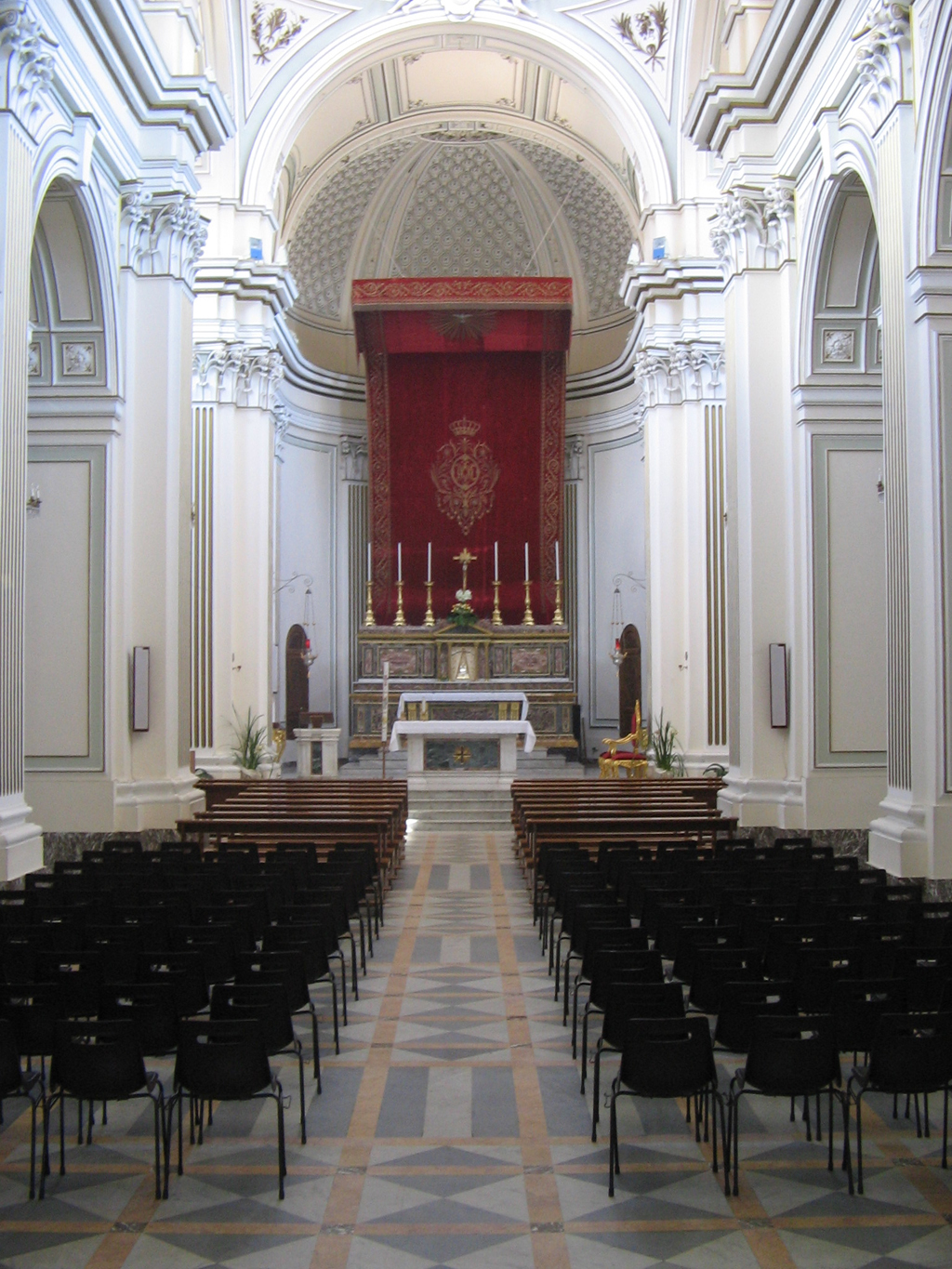 Chiesa Madre "S. Maria della Provvidenza", interno - Zafferana Etnea (CT).